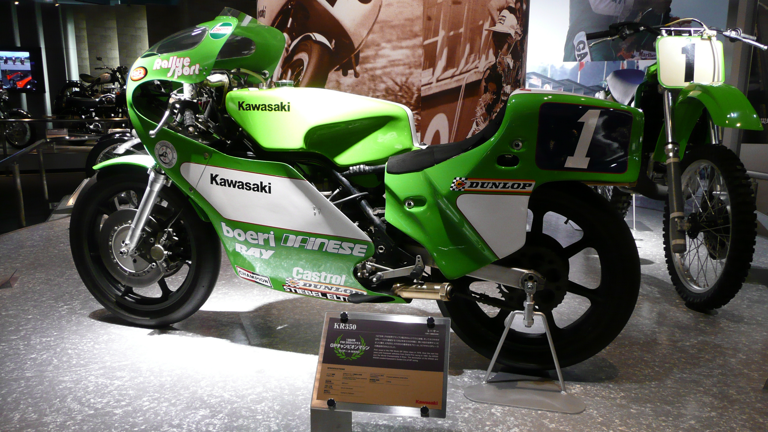 Kawasaki KR350、1982年 FIM 350ccクラス GPチャンピオンマシン、ライダー：アントン・マンク（Anton Mang） カワサキワールドにて撮影